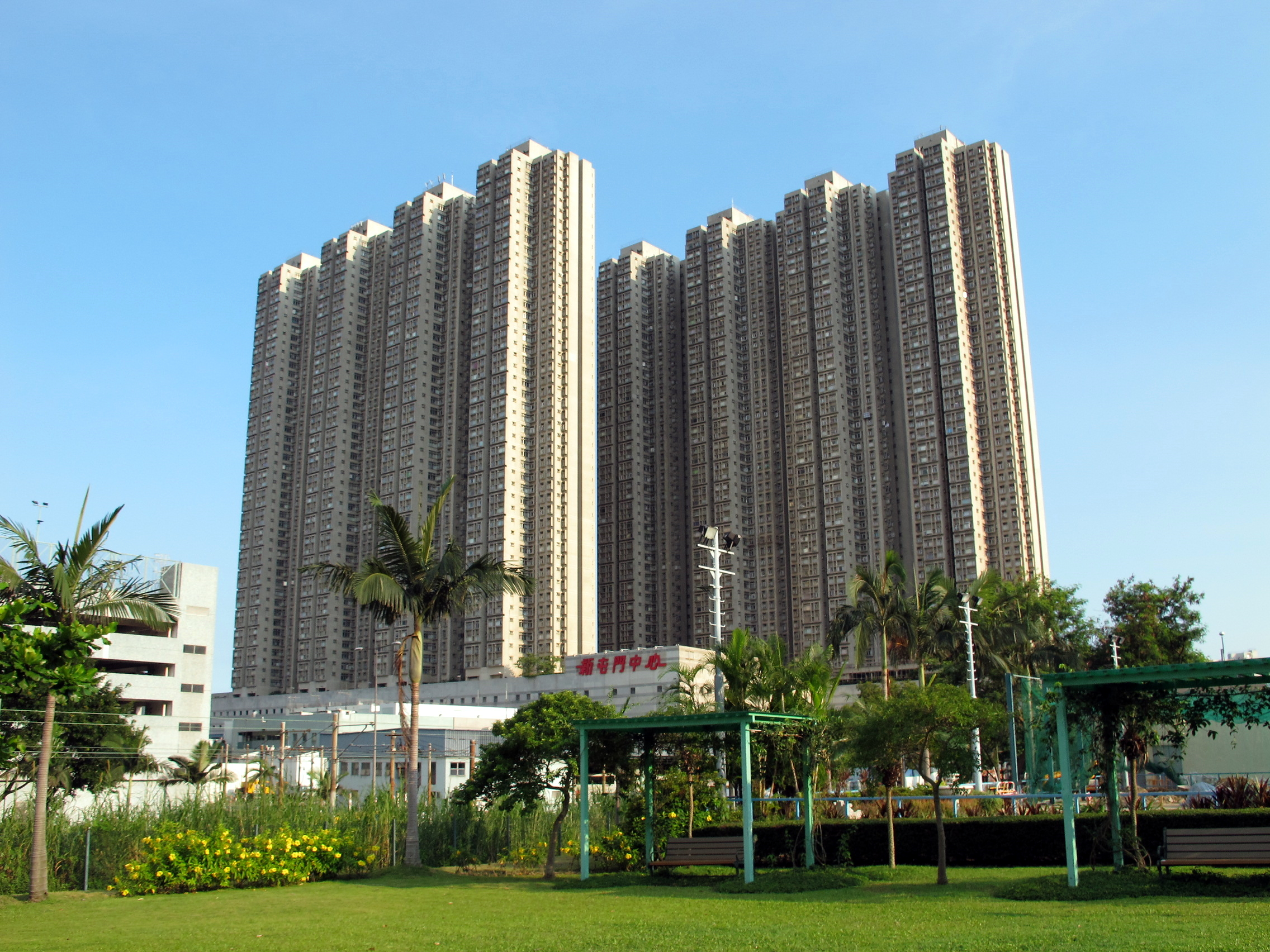 Sun Tuen Mun Centre 新屯門中心